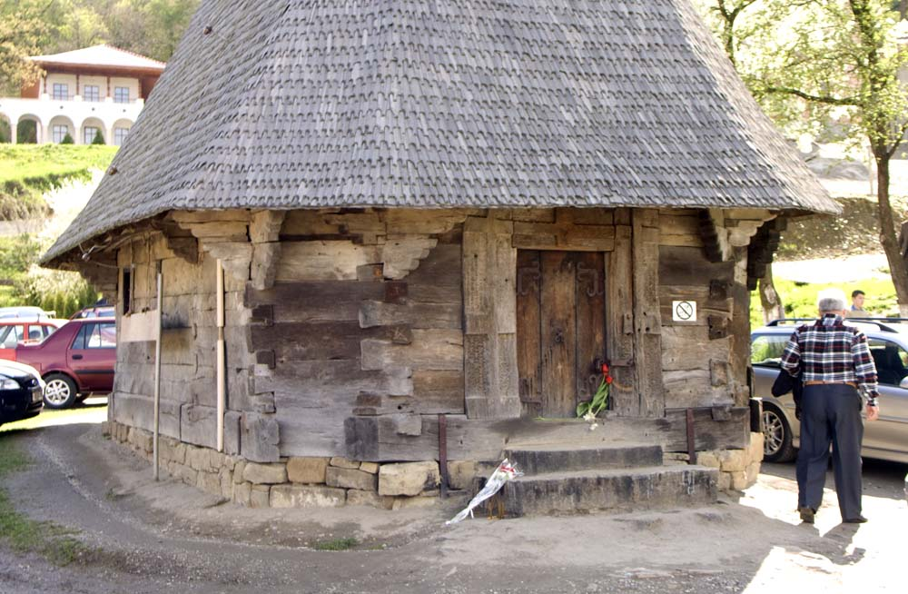 Biserica de lemn din Năsal Fânaţe